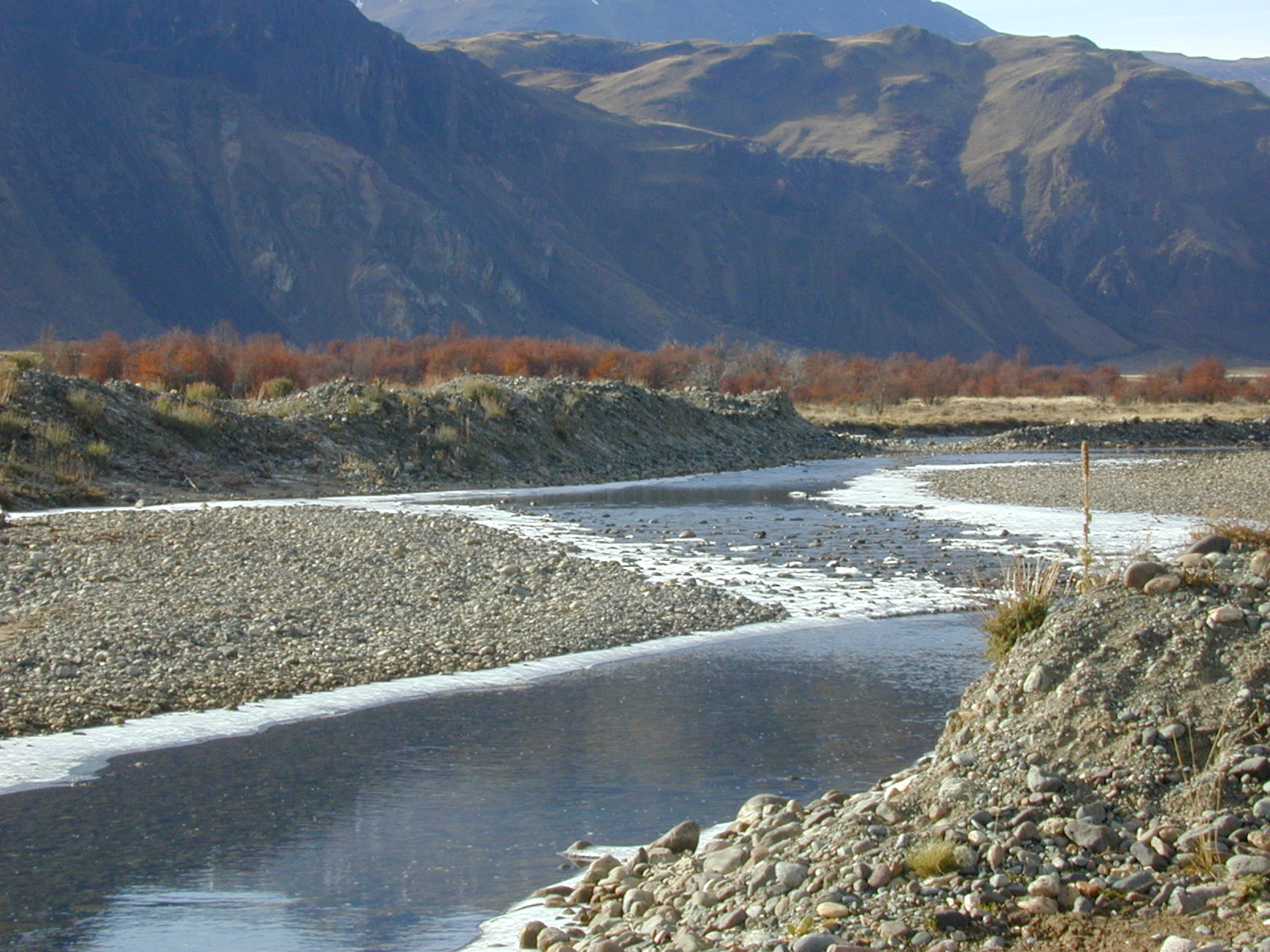 Río Chacabuco. Región de Aisén. Chile.